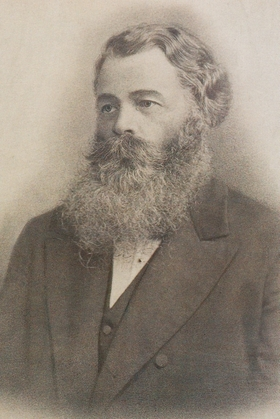 Голдобин Иван Флегонтович